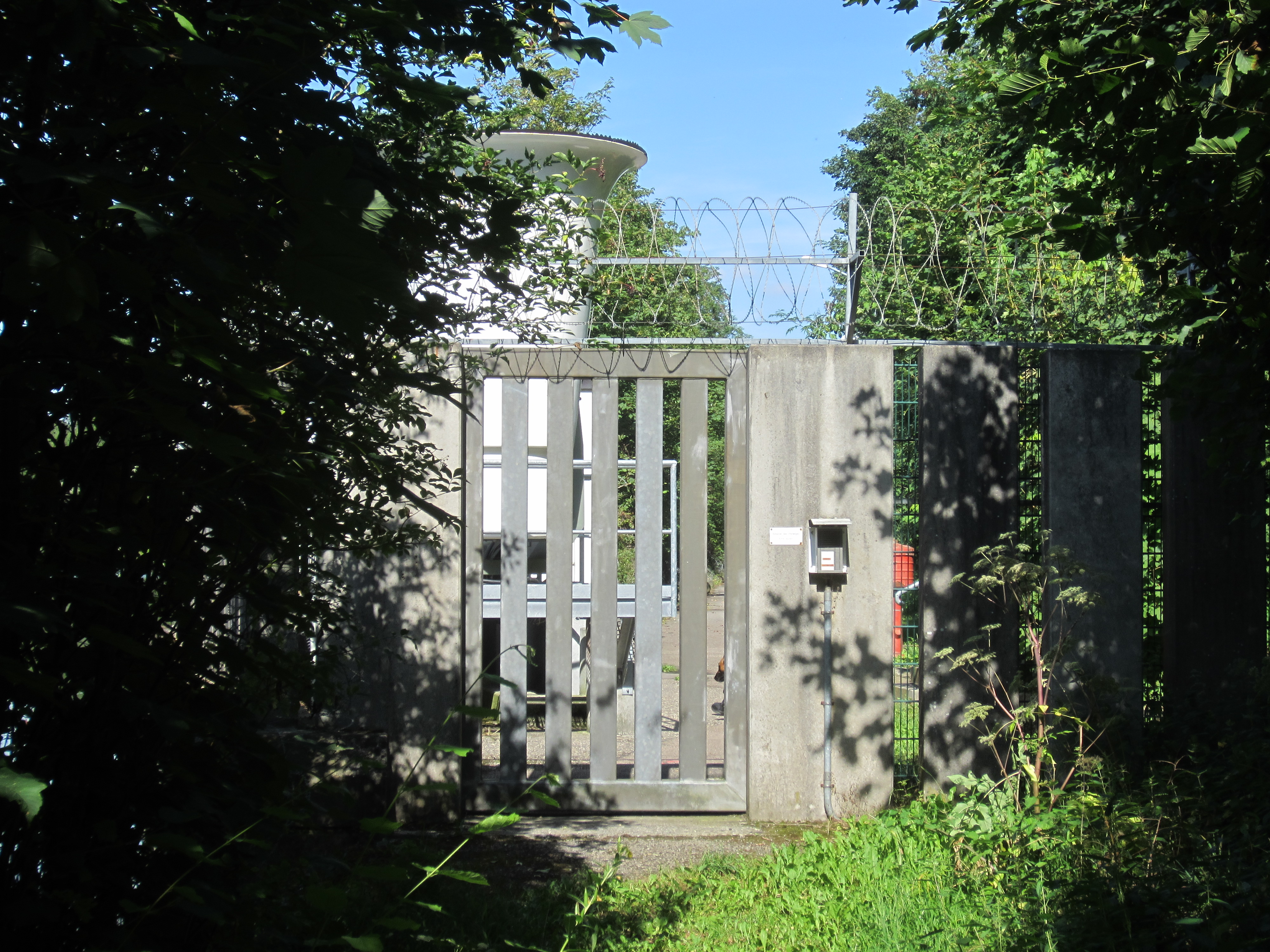 Kernkraftwerk Neckarwestheim